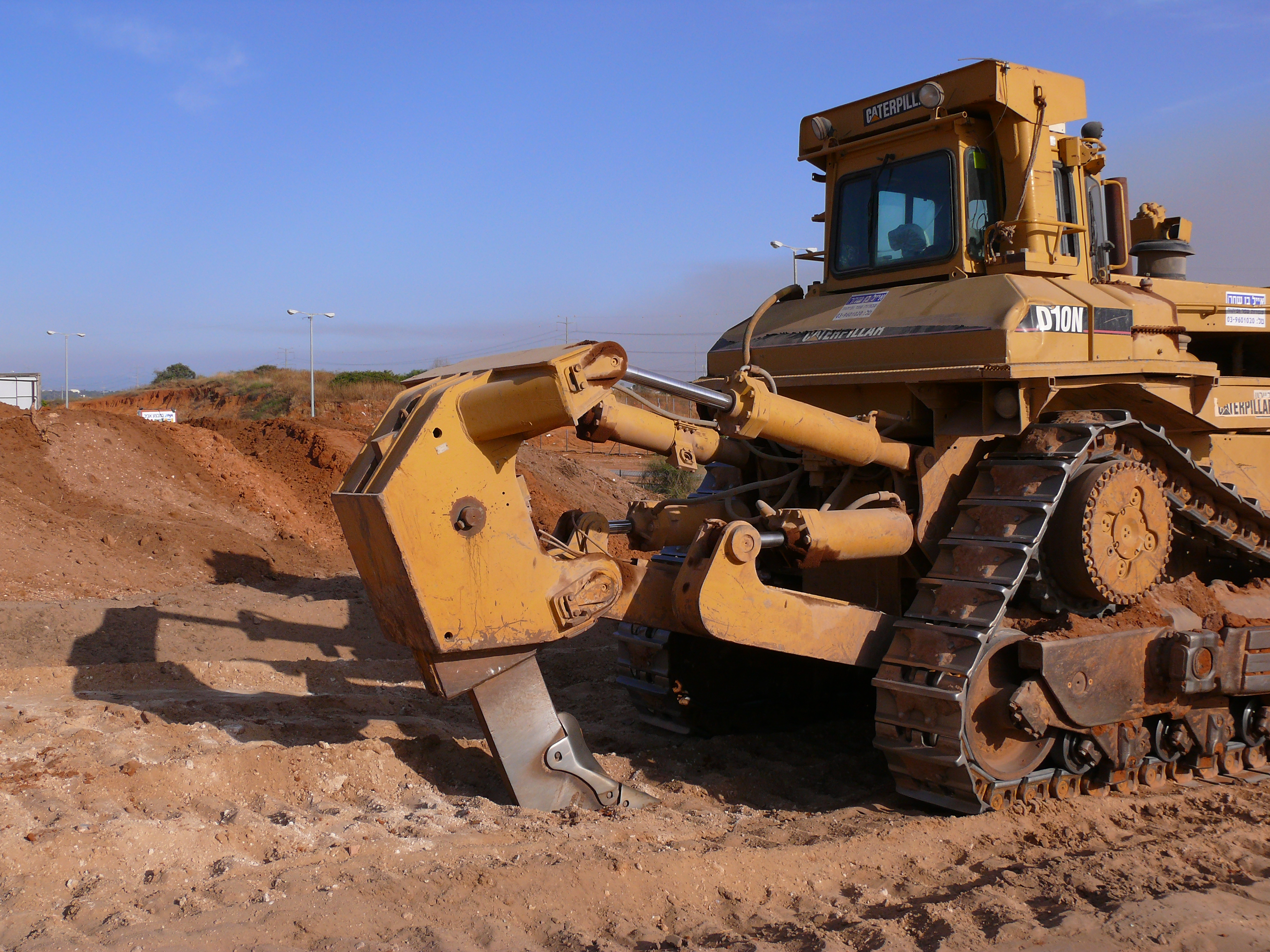 Caterpillar D10N bulldozer